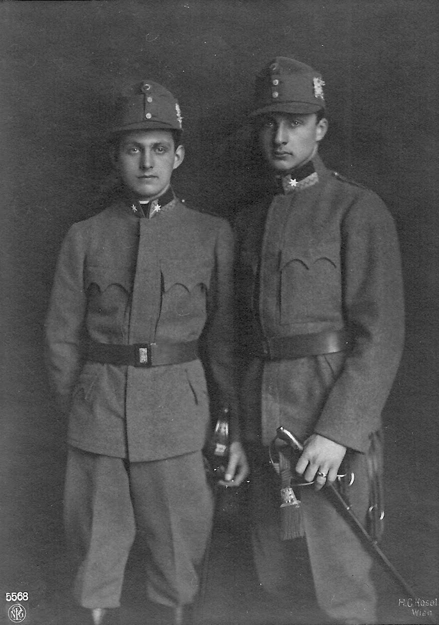 Erzherzog Leopold und Rainer von Österreich-Toskana.